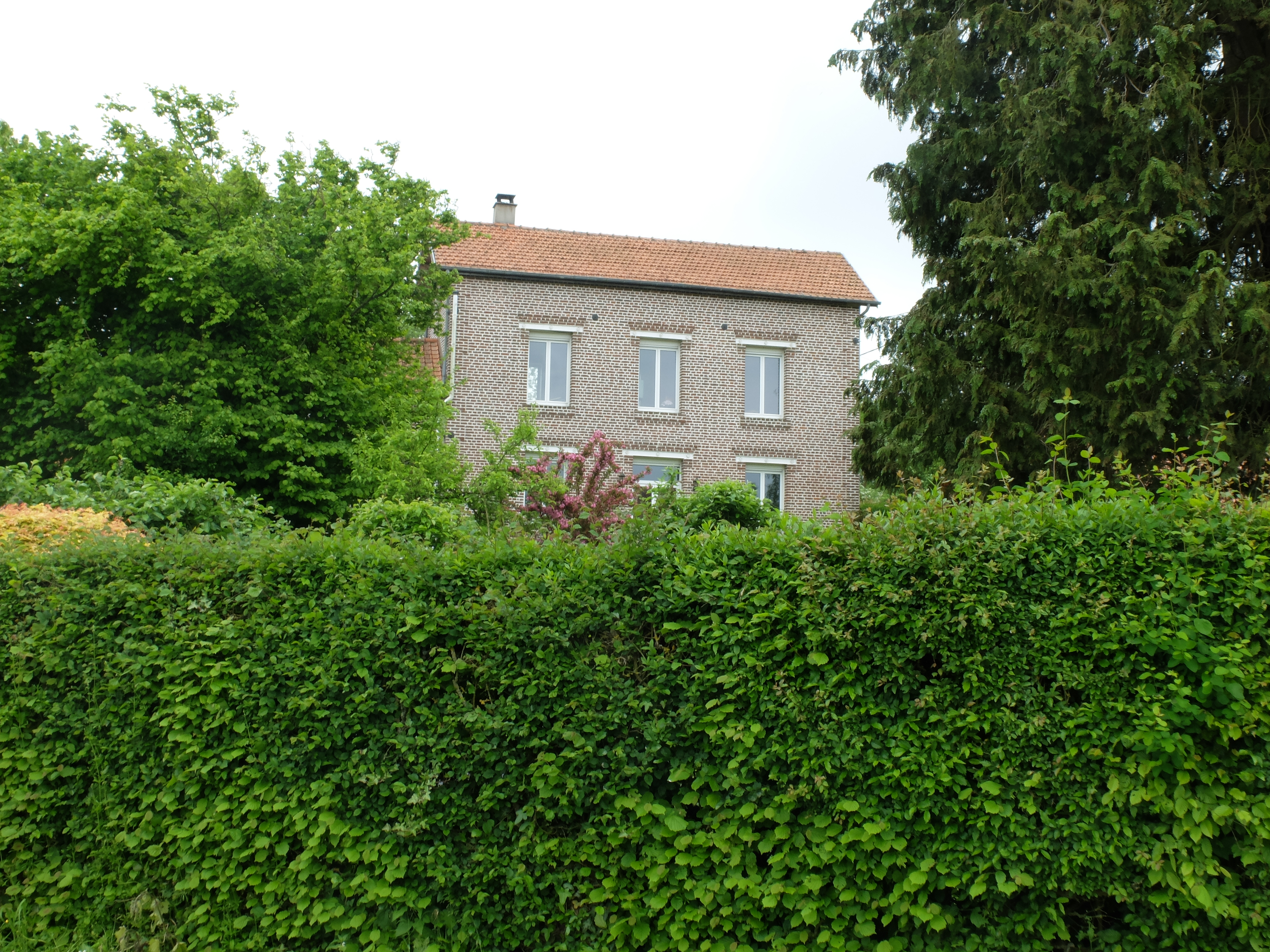 Vue de l'ancienne gare d'Enquin-sur-Baillons, devenue maison d'habitation.